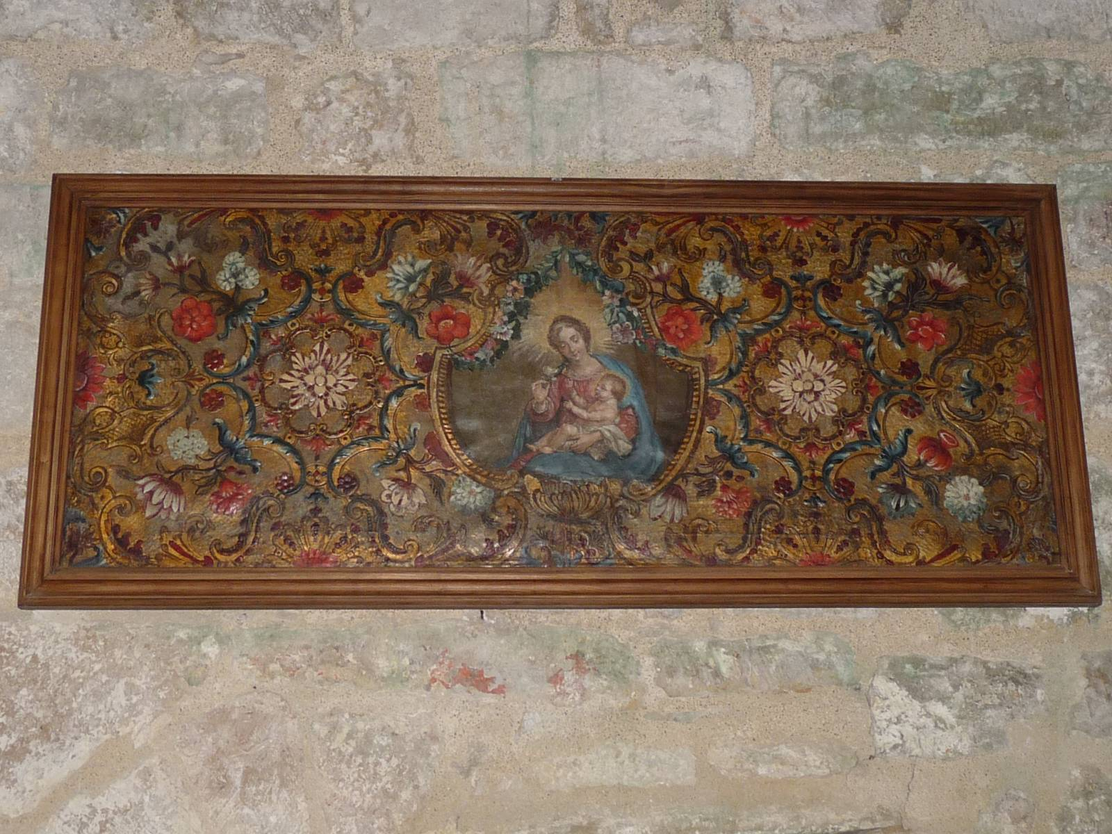 devant d'autel en cuir de Cordoue, 17è siècle, église d'Alloue, Charente, France